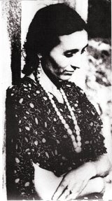 Polnische Roma-Lyrikerin und Sängerin Bronislawa Wajs